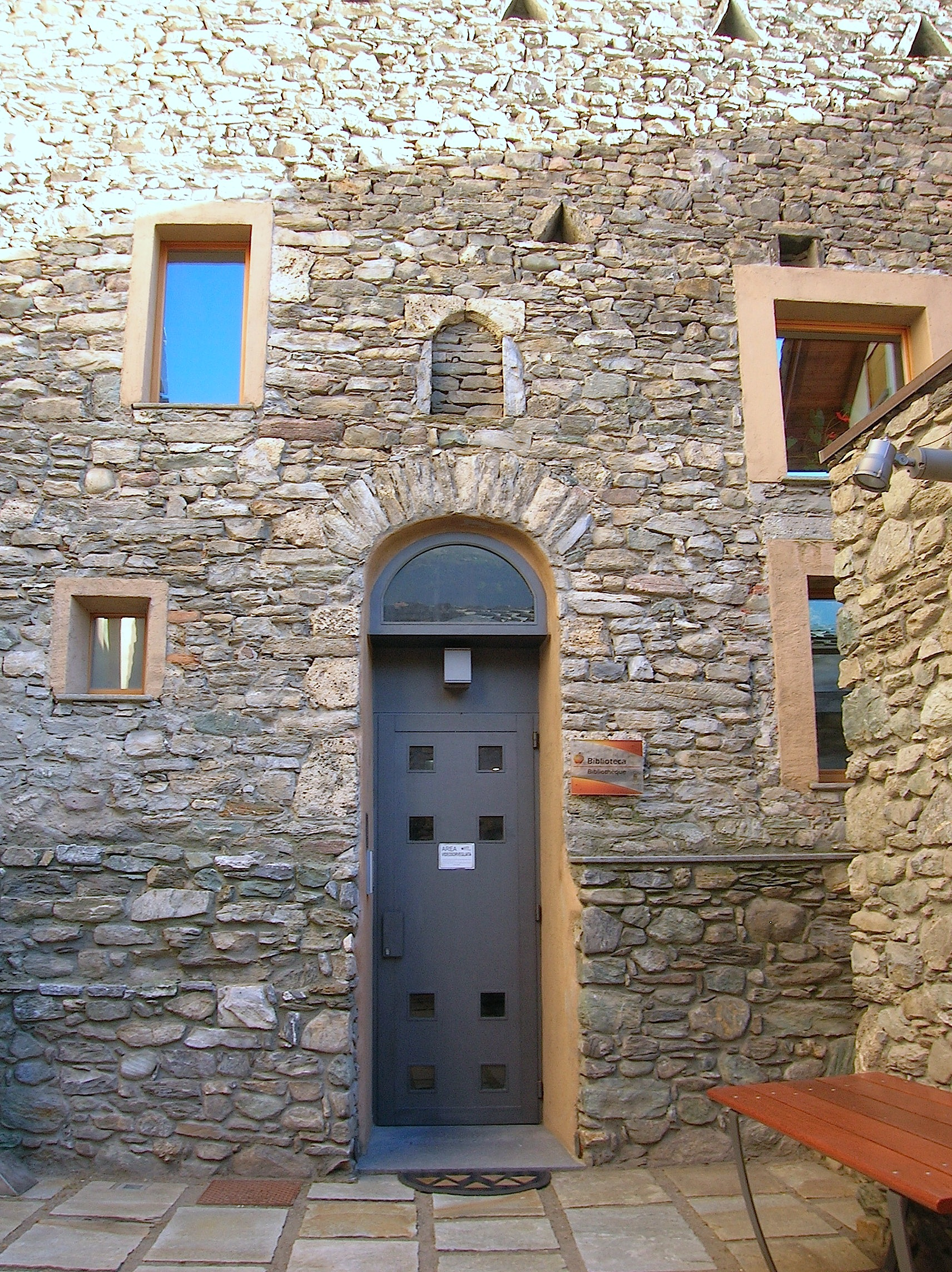 La Maison de St. Anselme nella Tour de Sant'Anselme, Gressan, Valle d'Aosta, Italia. This is a photo of a monument which is part of cultural heritage of Italy.